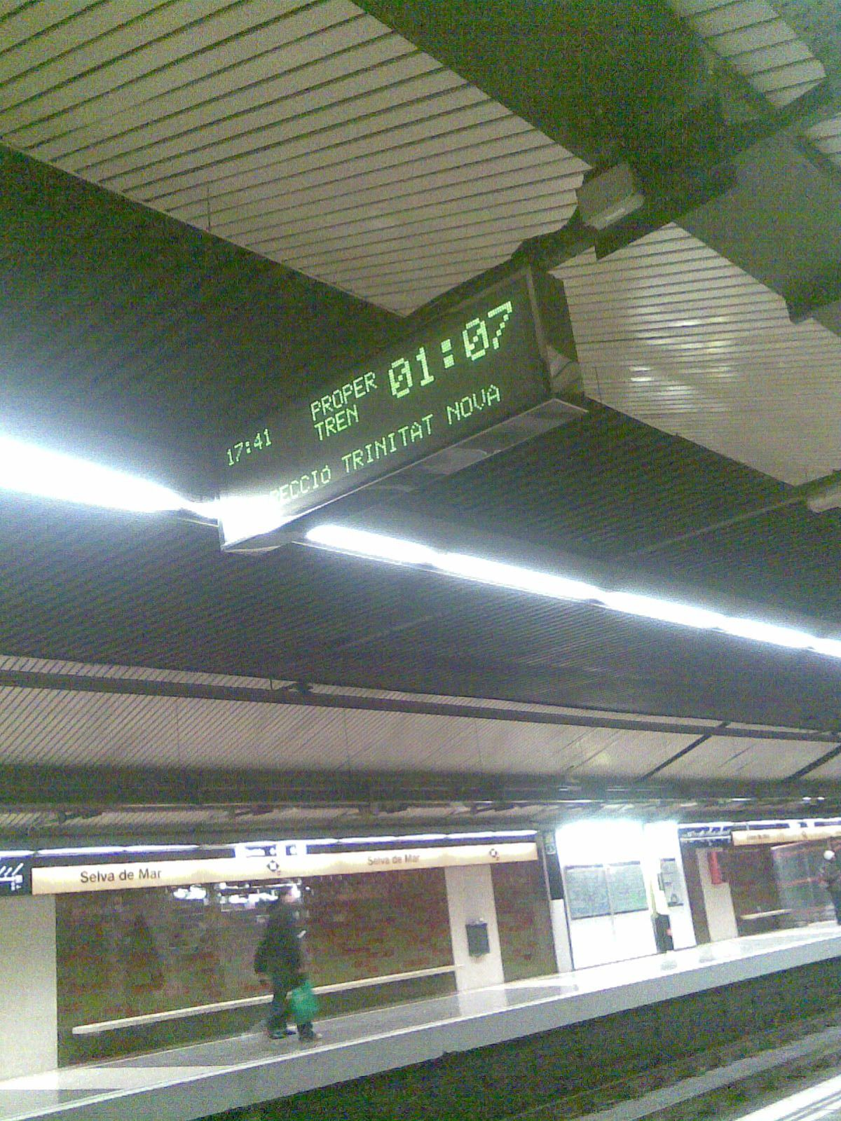 Selva de Mar, Barcelona Metro